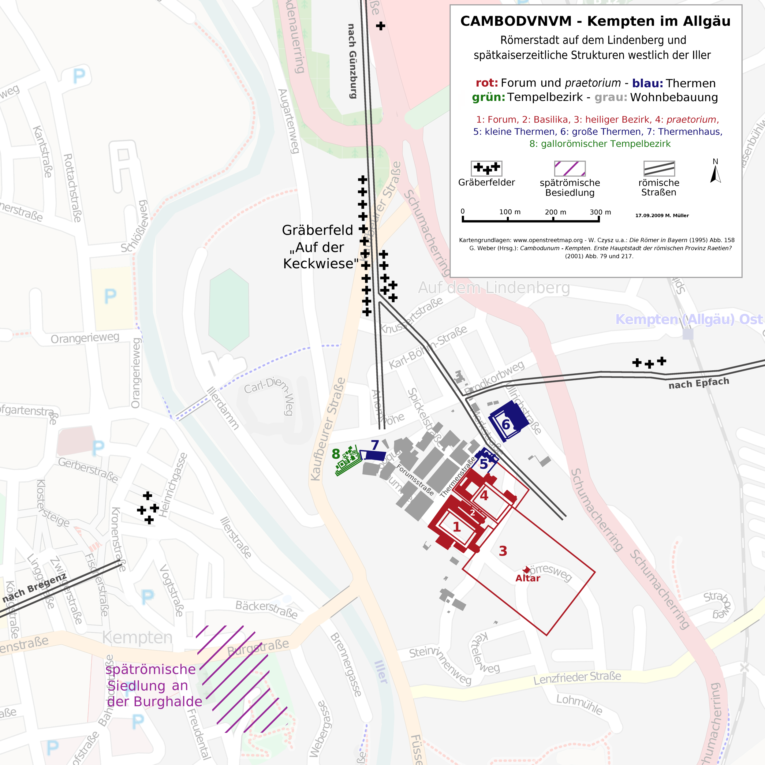 Lageplan der Römerstadt Cambodunum (Kempten im Allgäu).